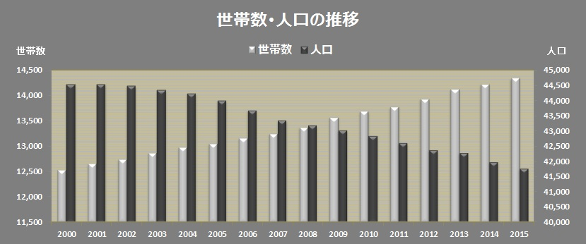 2000年以降における見附市の世帯数･人口推移